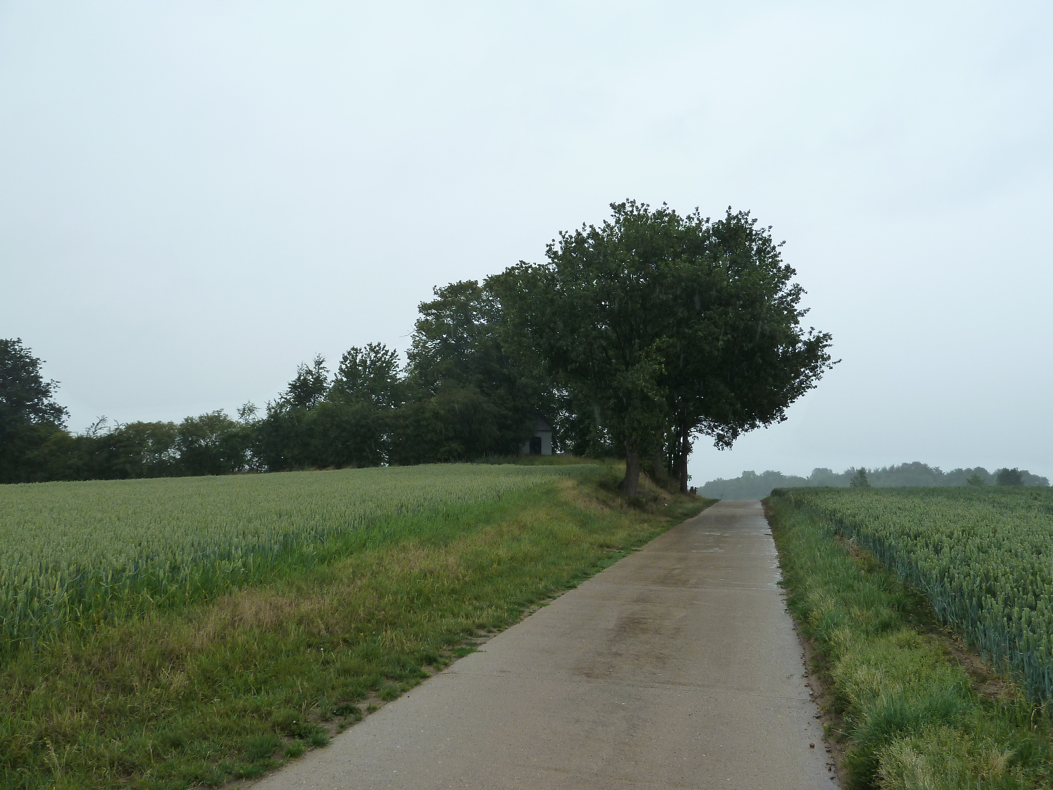 Tumulus d'Otrange, Oreye, Belgique